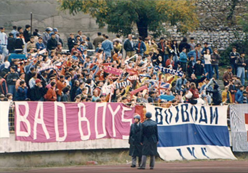 Војводи во Велес 1993